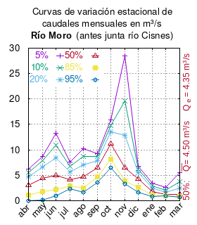 Curvas de variación estacional del río Moro antes junta río Cisnes. # Dirección General de Aguas # Diagnóstico y clasificación de los cursos y cuerpos de agua según objetivos de calidad. Cuenca del río Cisnes. # Santiago de Chile # Ministerio de Obras Públicas (Chile) # 2004 # url: # urlarchivo: # Tabla 4.3: Río Moro antes junta río Cisnes (m3/s), pág. 32 mes 5% 10% 20% 50% 85% 95% abr 6.180 5.502 4.680 3.109 1.175 0.039 may 8.774 7.825 6.675 4.478 1.771 0.181 jun 13.338 10.916 8.472 4.971 2.154 1.025 jul 7.665 6.713 5.717 4.205 2.881 2.307 ago 10.262 8.721 7.111 4.677 2.555 1.640 sep 9.314 8.684 7.920 6.461 4.663 3.607 oct 15.844 14.809 13.556 11.161 8.211 6.478 nov 28.501 19.613 12.843 6.523 3.858 3.280 dic 6.734 6.180 5.508 4.223 2.641 1.712 ene 3.401 2.940 2.460 1.734 1.090 0.797 feb 2.598 2.100 1.679 1.221 0.977 0.910 mar 5.477 3.740 2.449 1.289 0.828 0.733 This plot was created with Gnuplot.